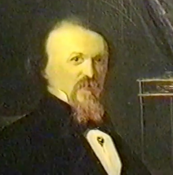 Anselmo Gavioli